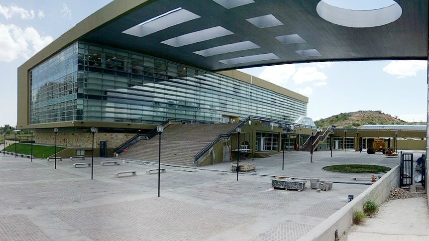 Ciudad Juicial de la Provincia de Neuquén (Lama-Soler Arquitectos, 2009-14), Argentina.